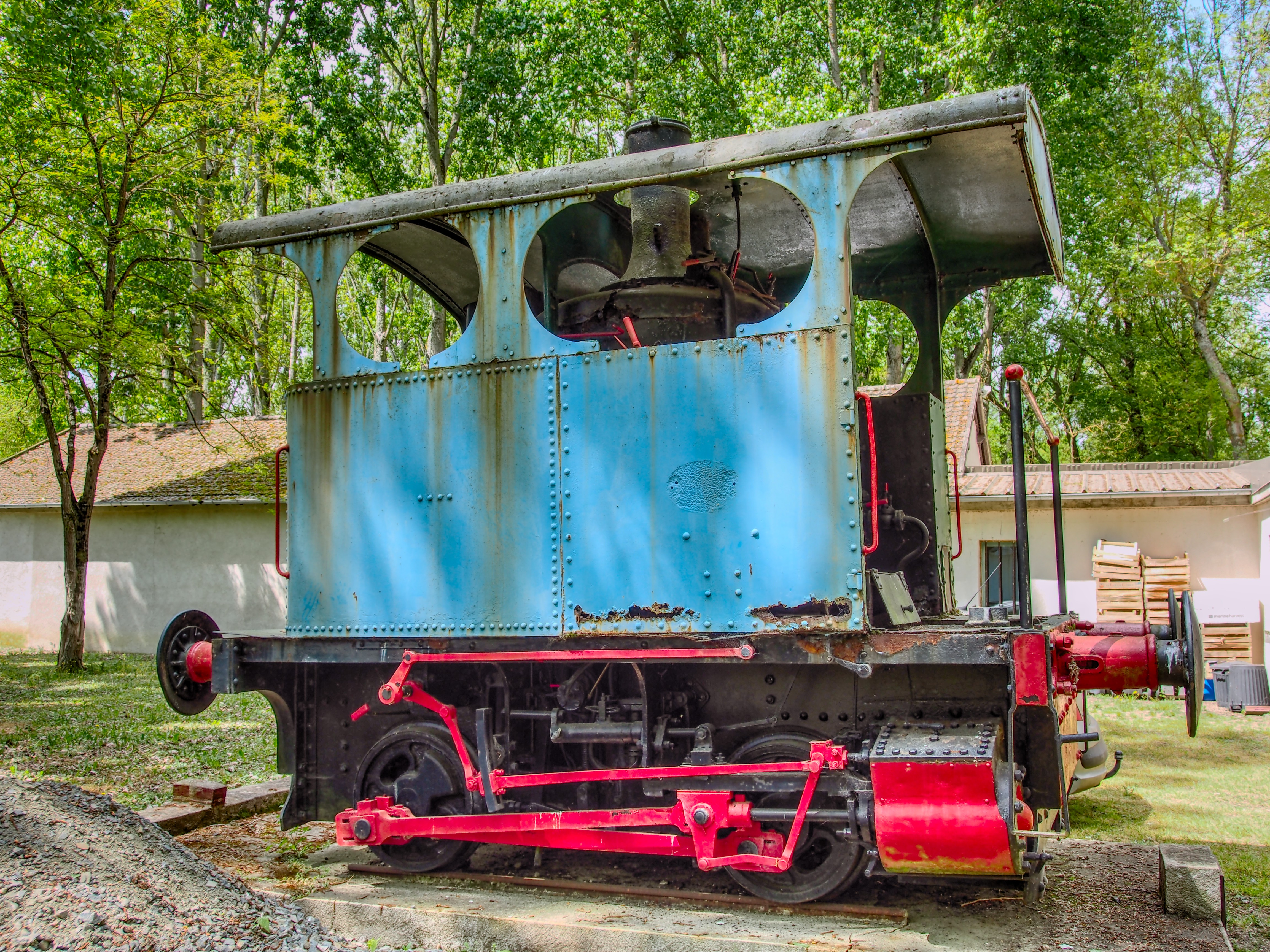 Photographed at Musée Maurice Dufresne, Azay-le-Rideau, France.